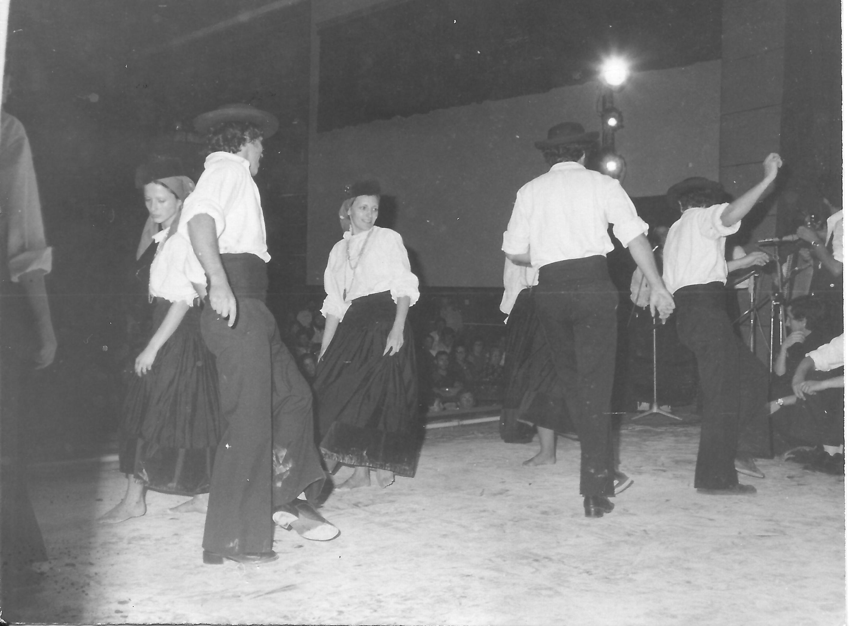 Actuação do OUP em Vila Franca, Açores, Agosto de 76.